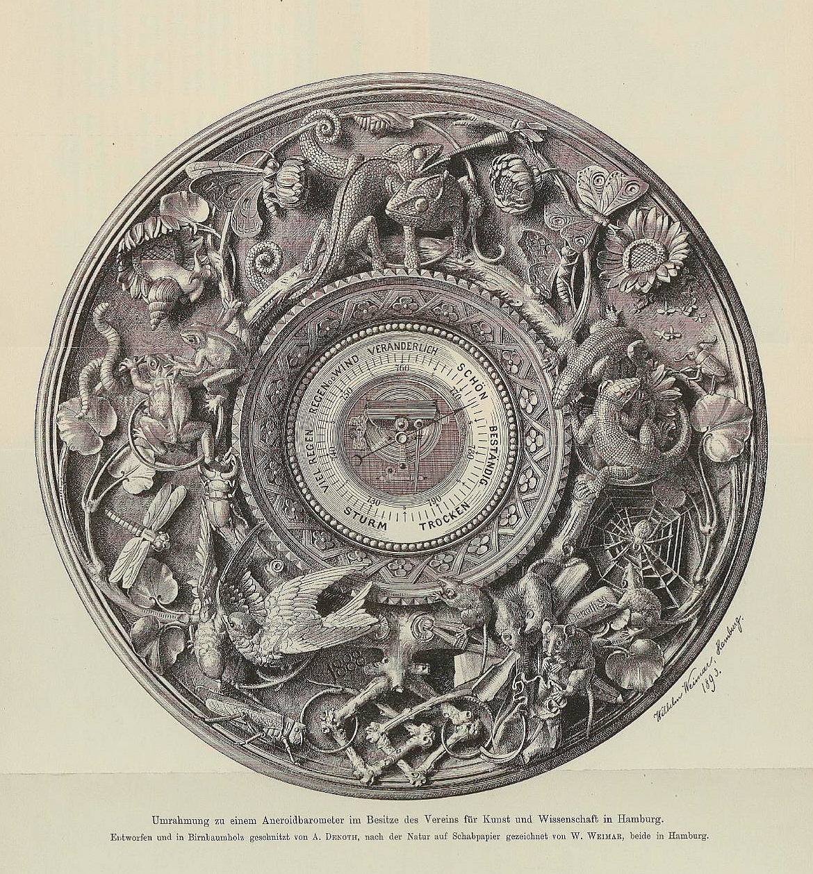 Das Aneroidbarometer von Aloys Denoth, das der Zeichner Wilhelm Weimar 1894 abgezeichnet hat, damit man Details erkennen kann. Die Zeichnung wurde im Kunstgewerbeblatt Nr. 5/1894 gemeinsam mit einem erläuternden Text veröffentlicht